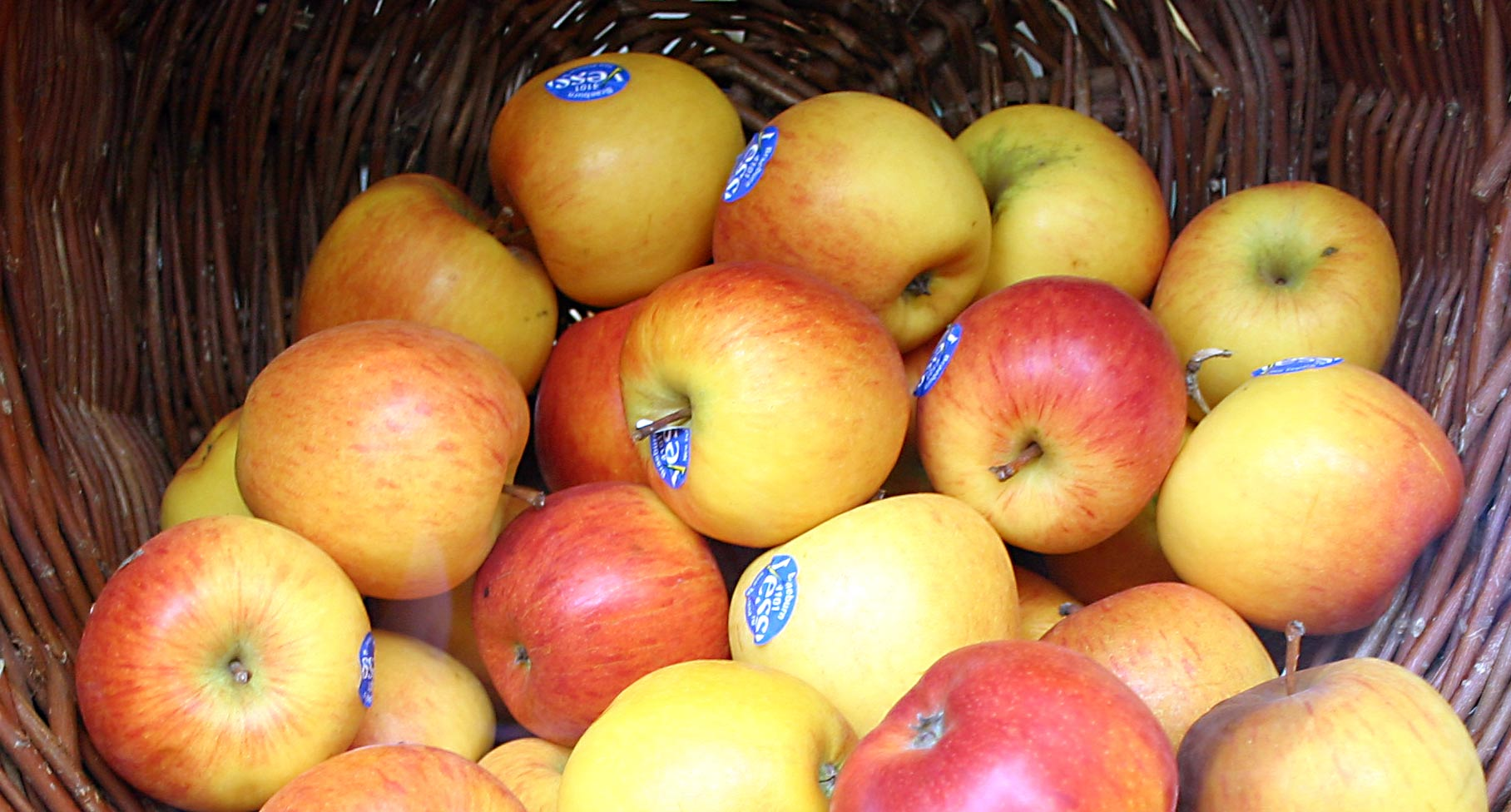 Braeburn Malus 'Braeburn' ist eine vergleichsweise neue Apfelsorte, die ursprünglich aus Neuseeland stammt.